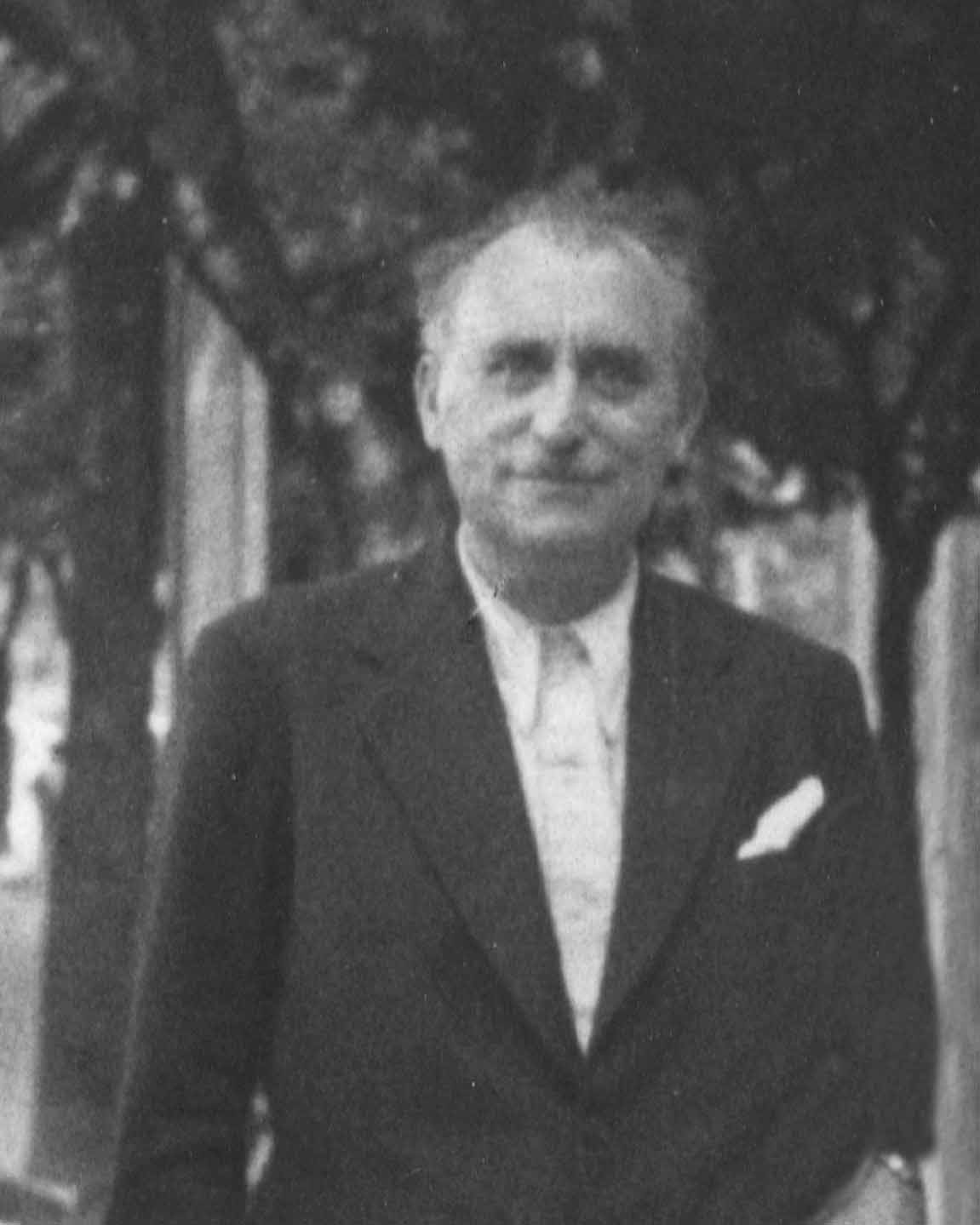 Antonio Fuortes a Perugia, 1939